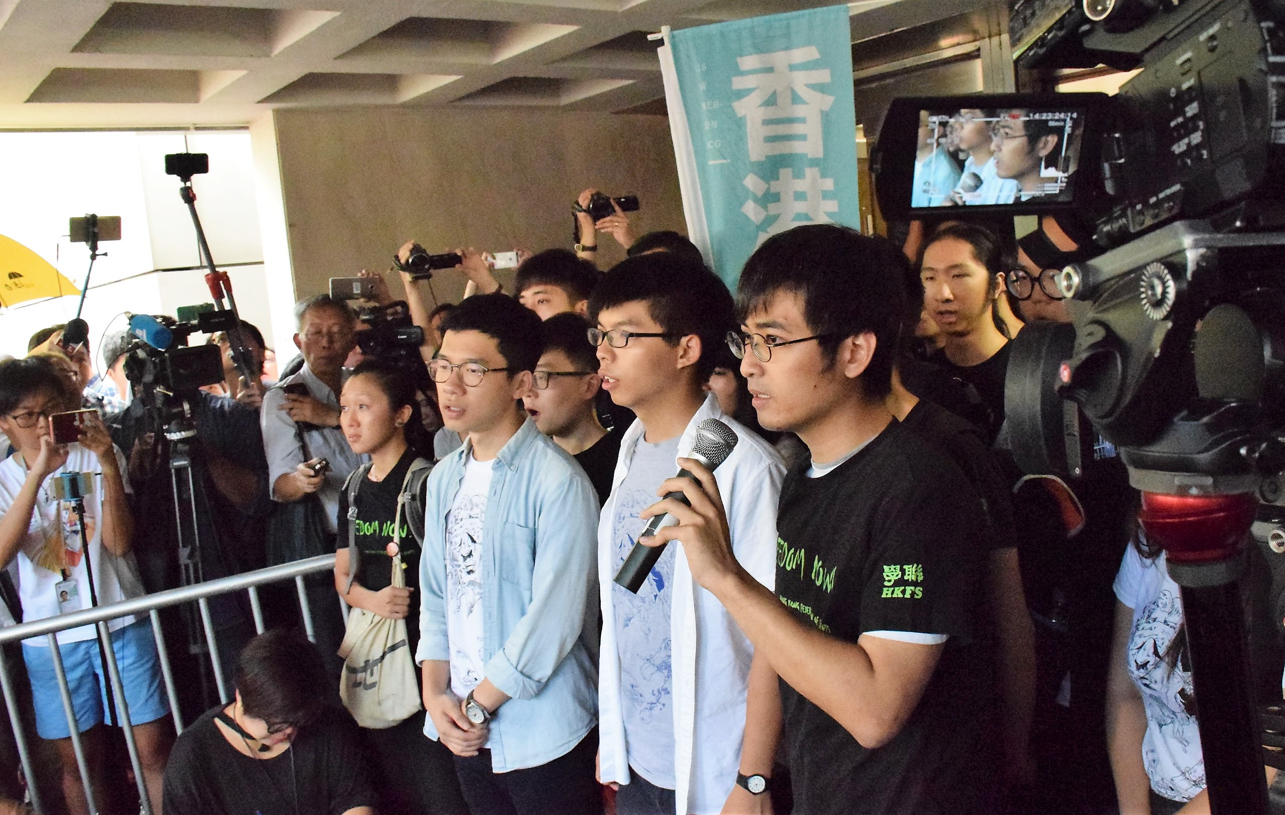 前學聯秘書長周永康(右起)、香港眾志秘書長黃之鋒、香港眾志主席羅冠聰 (攝影：美國之音湯惠芸)